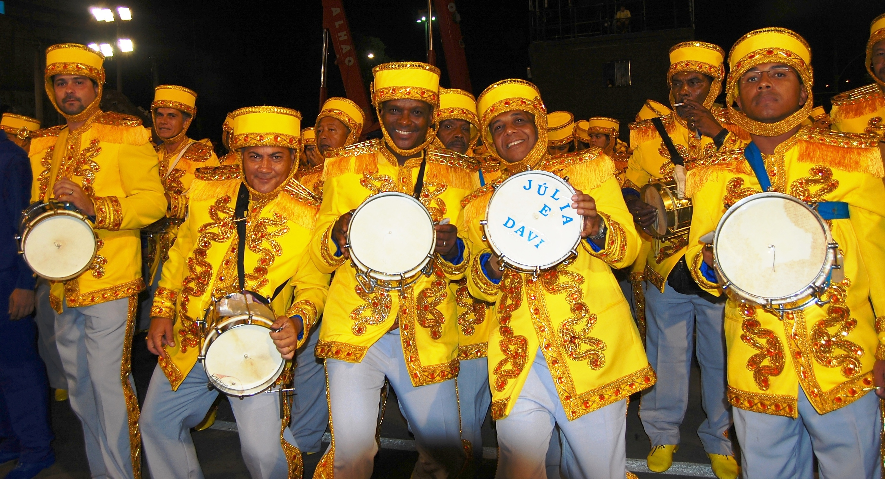 Tijuca